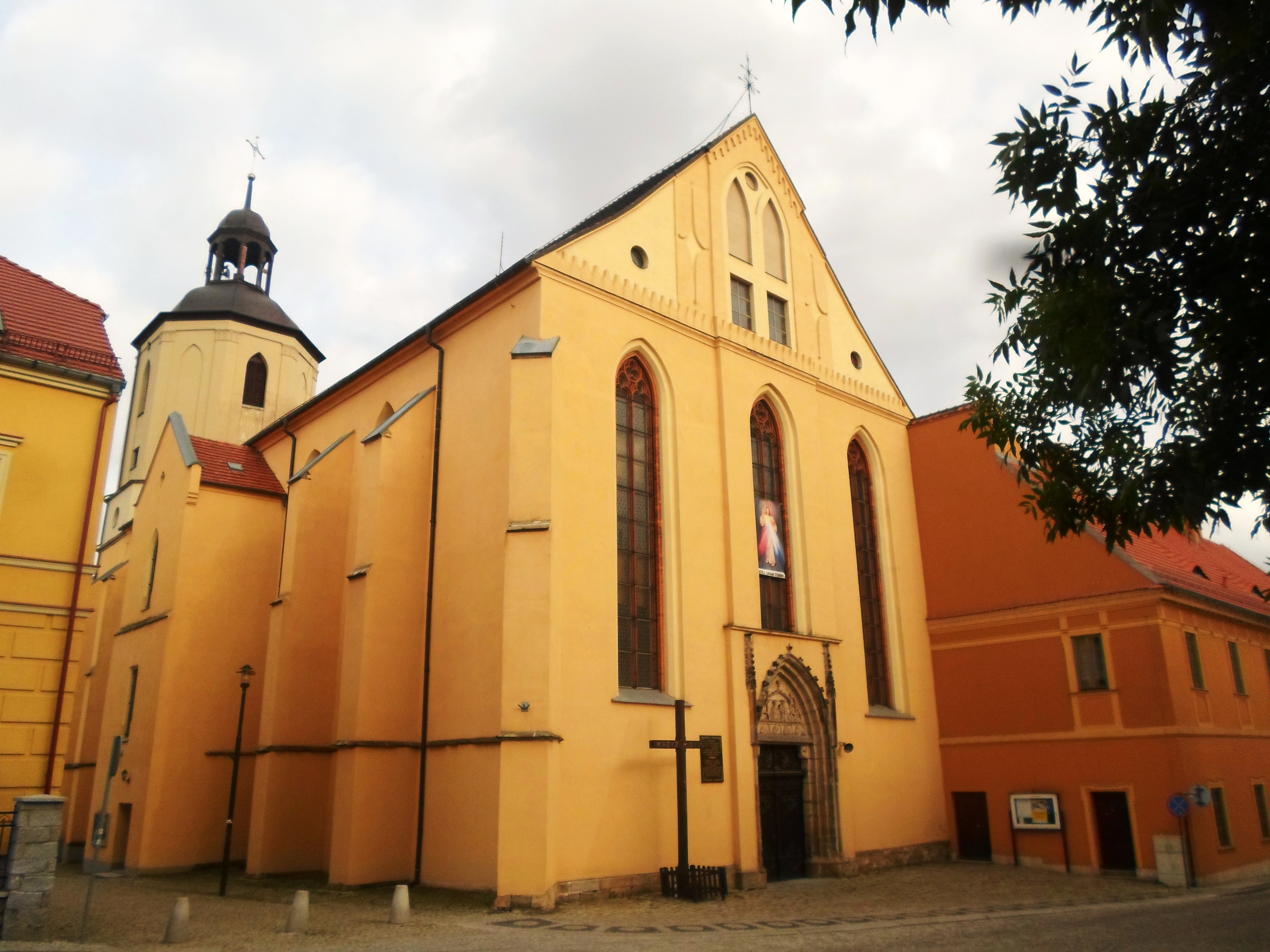 Strzegom, kaplica św. Antoniego, 1520